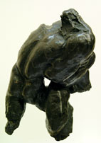 Photo : pixis. Autorisation de l'ayant-droit pour wikipedia. Autorisation-OTRS-GFDL|otrs=2006072710012609|auteur=Rose-Hélène Iché